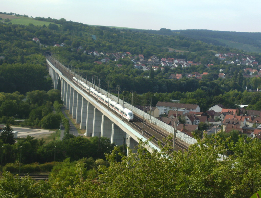 Maintalbrücke Veitshöcheim mit ICE Richtung München